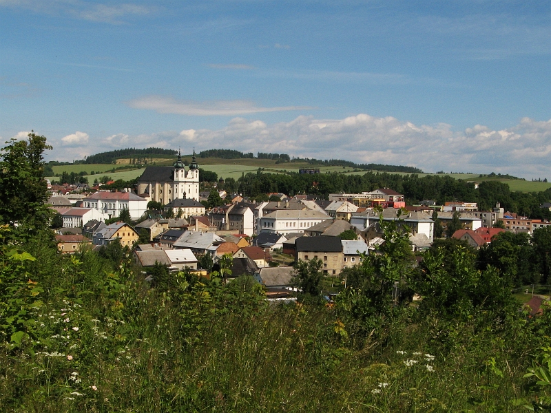 Kostel Nanebevzetí P. Marie s farou (Budišov nad Budišovkou), nám. Halaškovo, Budišov nad Budišovkou